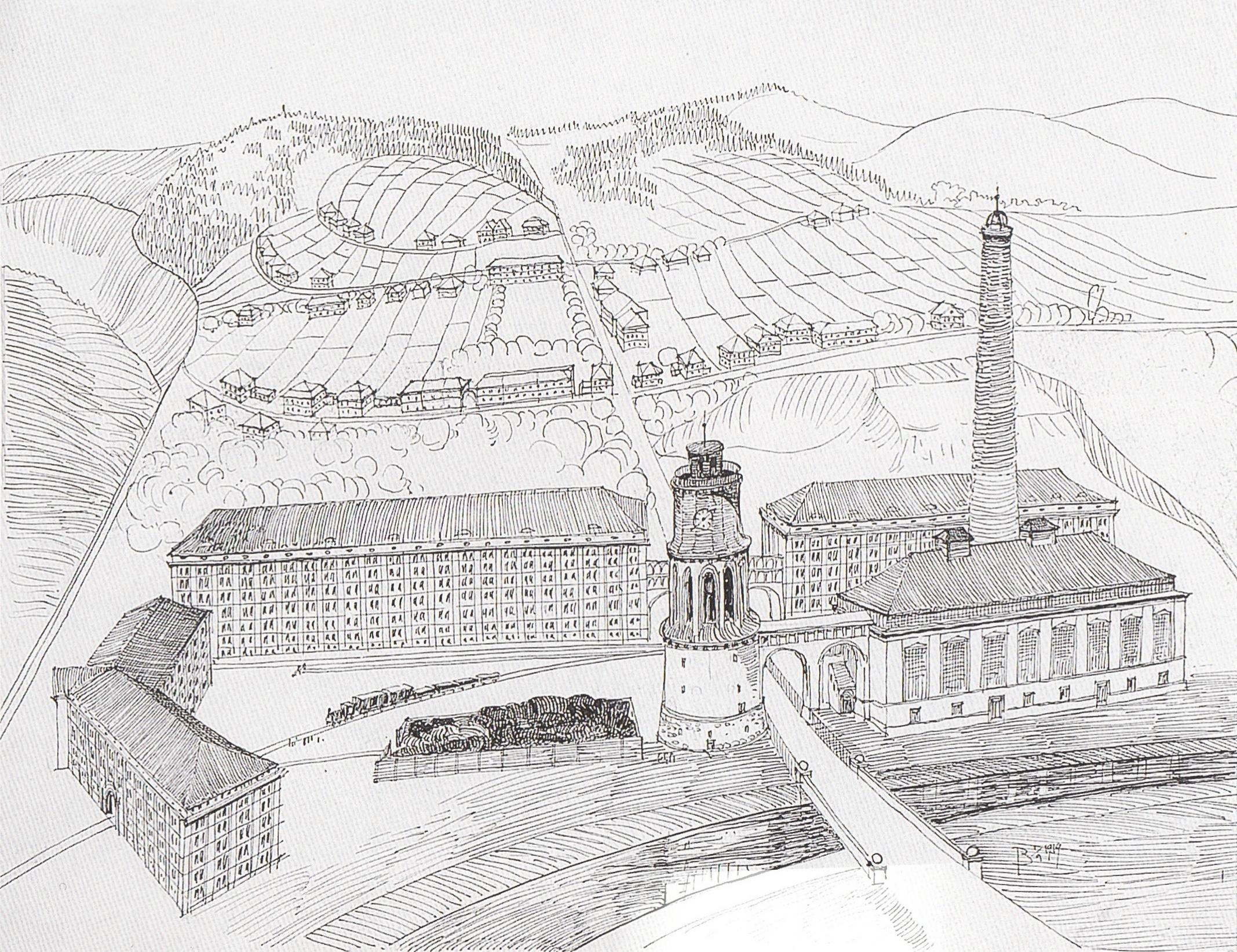 Leopold Bauer: Návrh areálu továrny na koberce Ignaz Ginzkey & Co. ve Vratislavicích nad Nisou. V letech 1916 - 1919 realizována pouze část projektu.